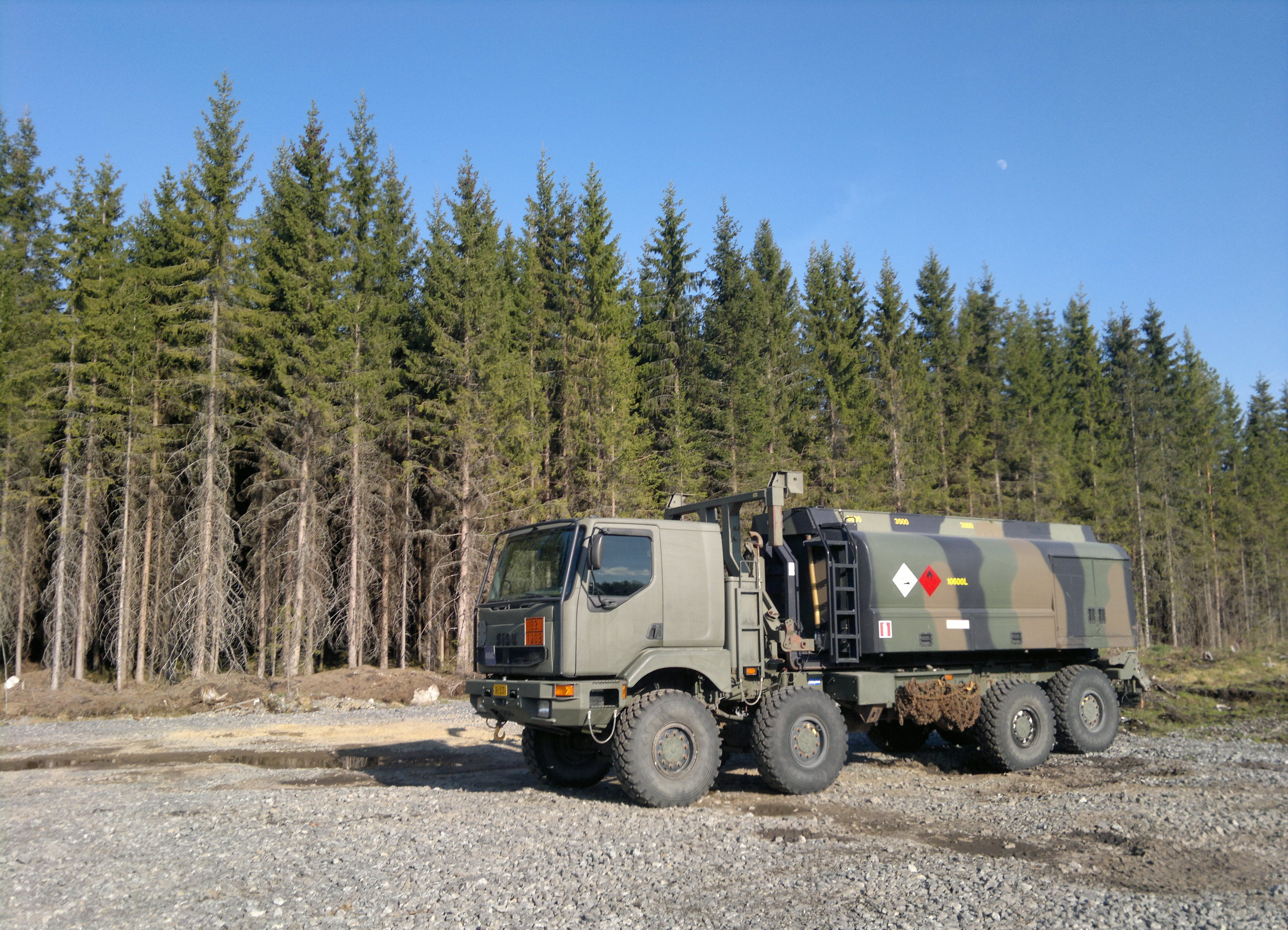 Sisu E11T 8×8 polttoainesäiliöin.